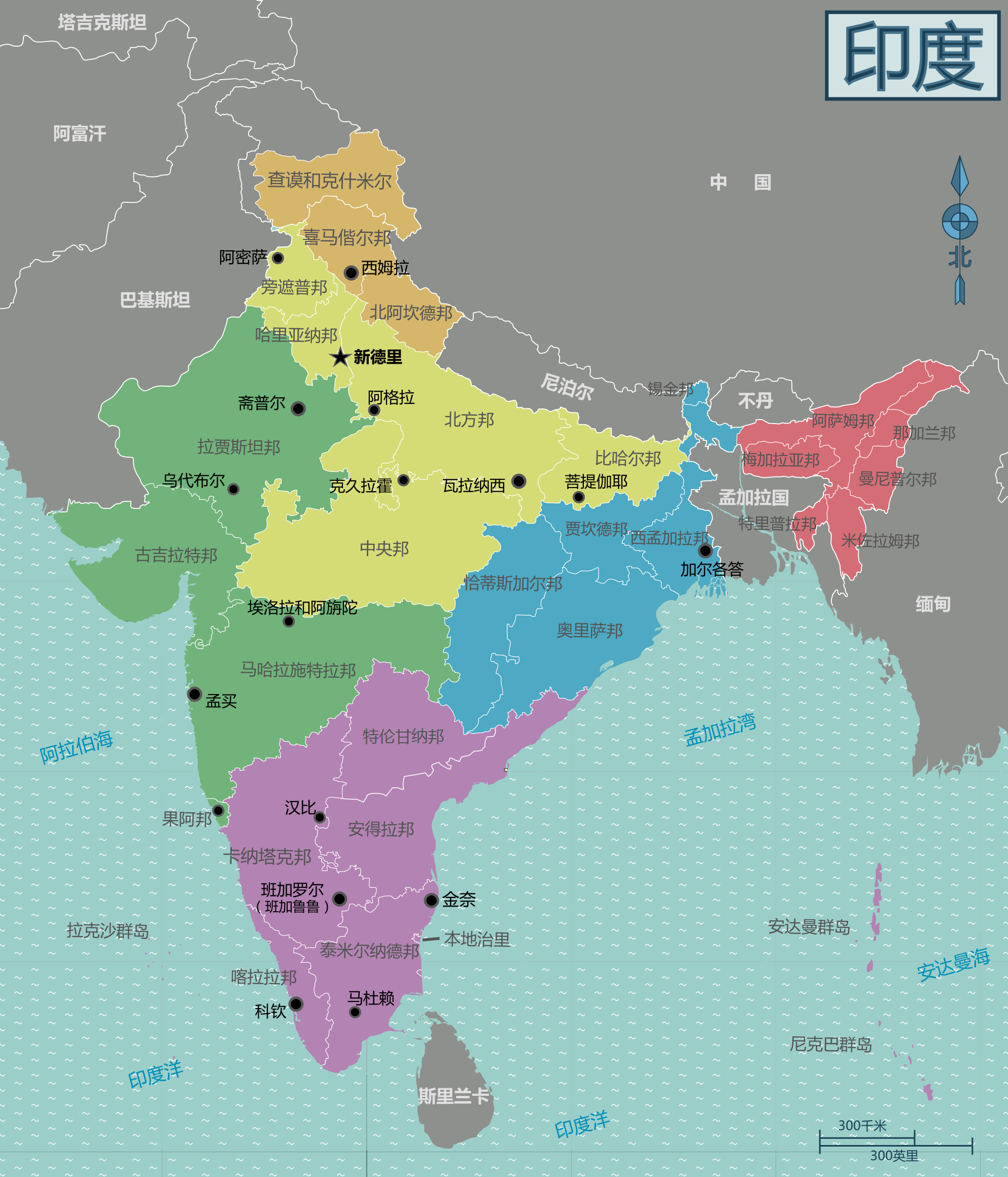 适用于维基导游的印度各邦和地区地图。